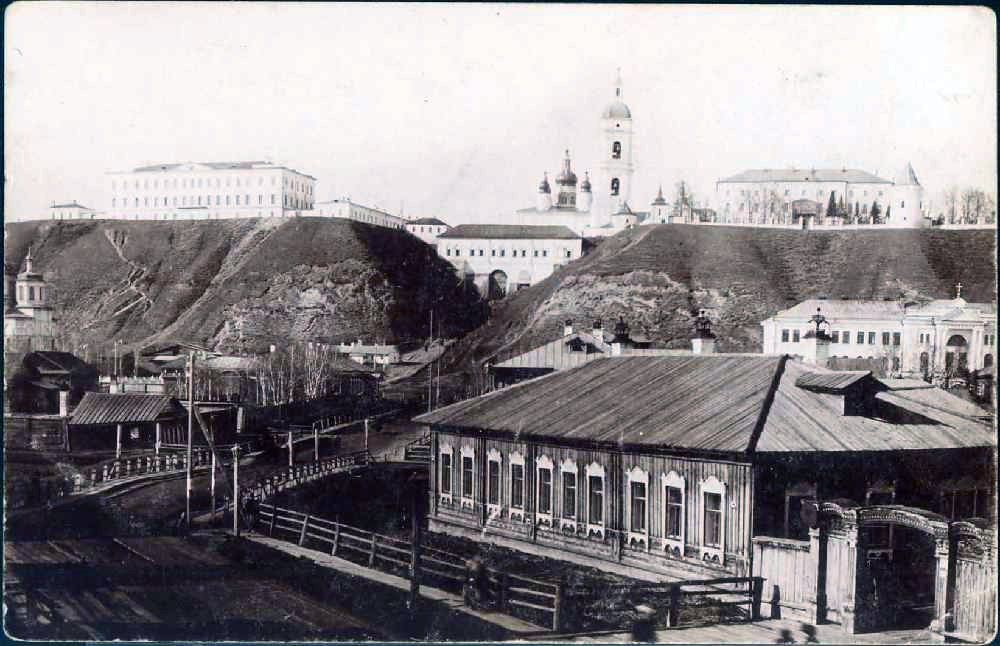 Тобольск (начало XX в.)